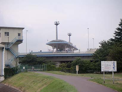 稲城大橋有料道路料金所